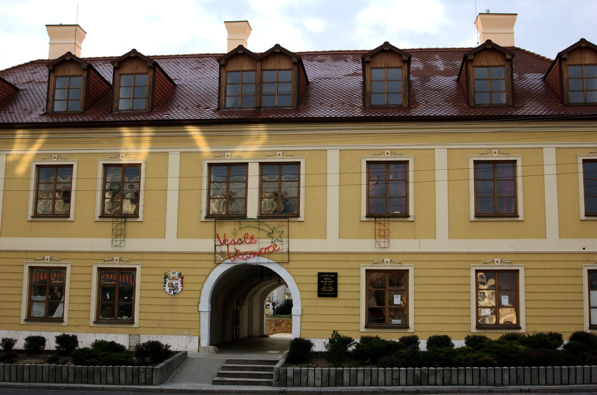 Beňovského kúria, Vrbové